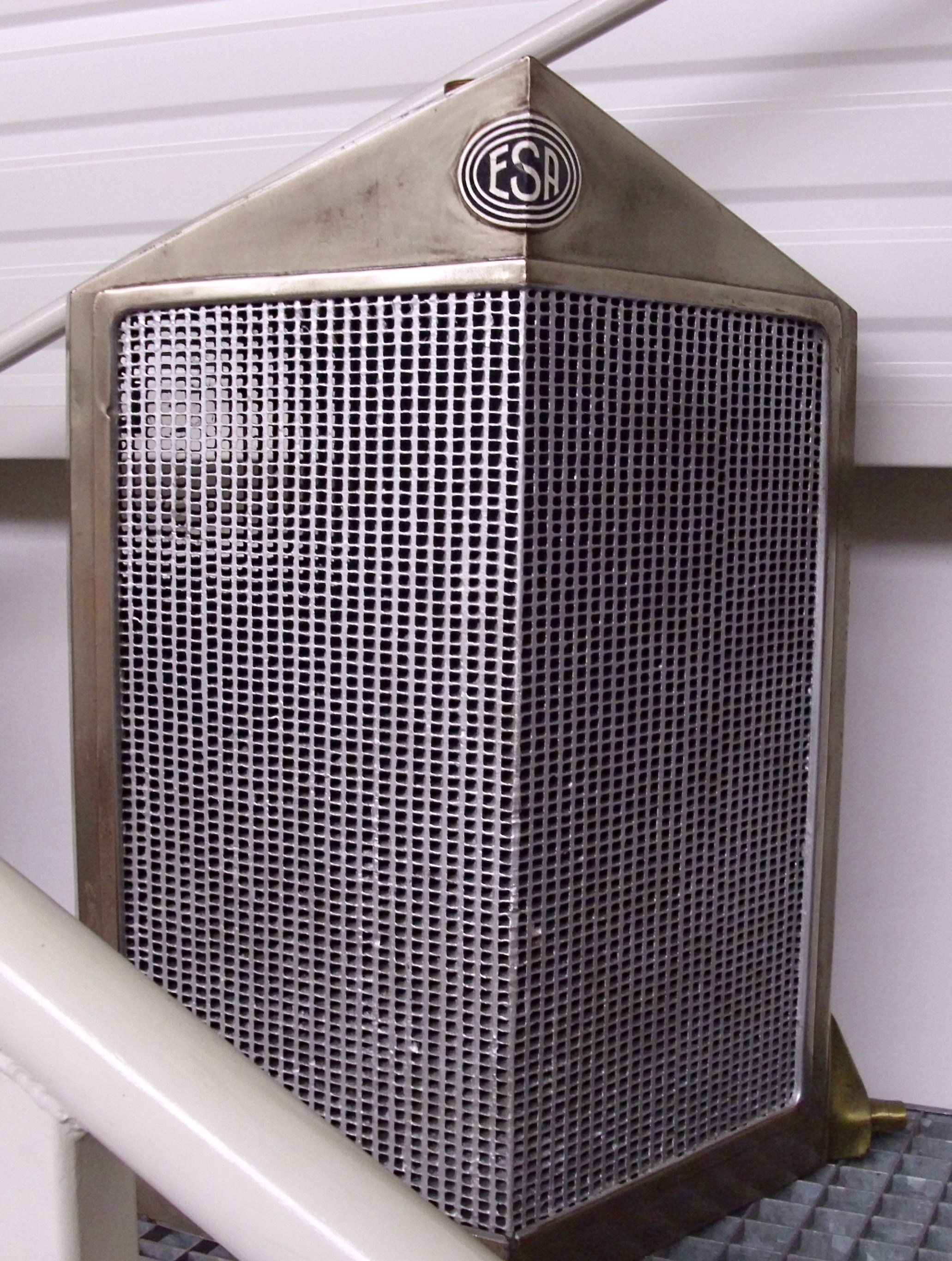 Kühlergrill eines ESA im Oldtimer-Museum Kröpfl